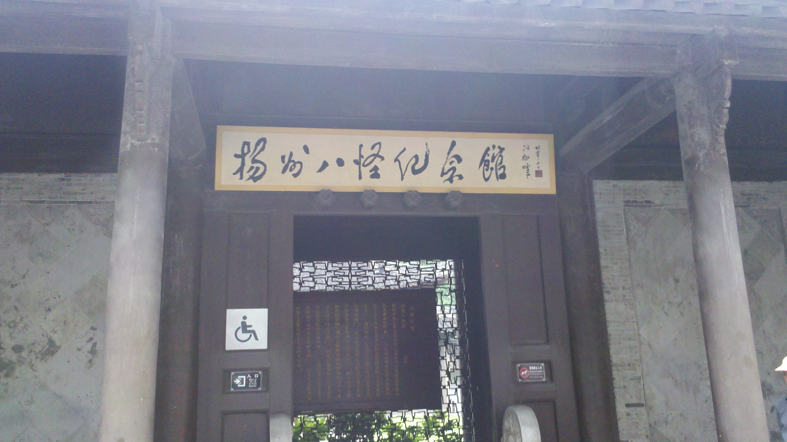 扬州八怪纪念馆，位于江苏省扬州市瘦西湖风景区，为纪念清朝扬州八怪“郑燮、罗聘、黄慎、李方膺、高翔、金农、李鱓和汪士慎”而建立的纪念馆。此图为纪念馆的大门。